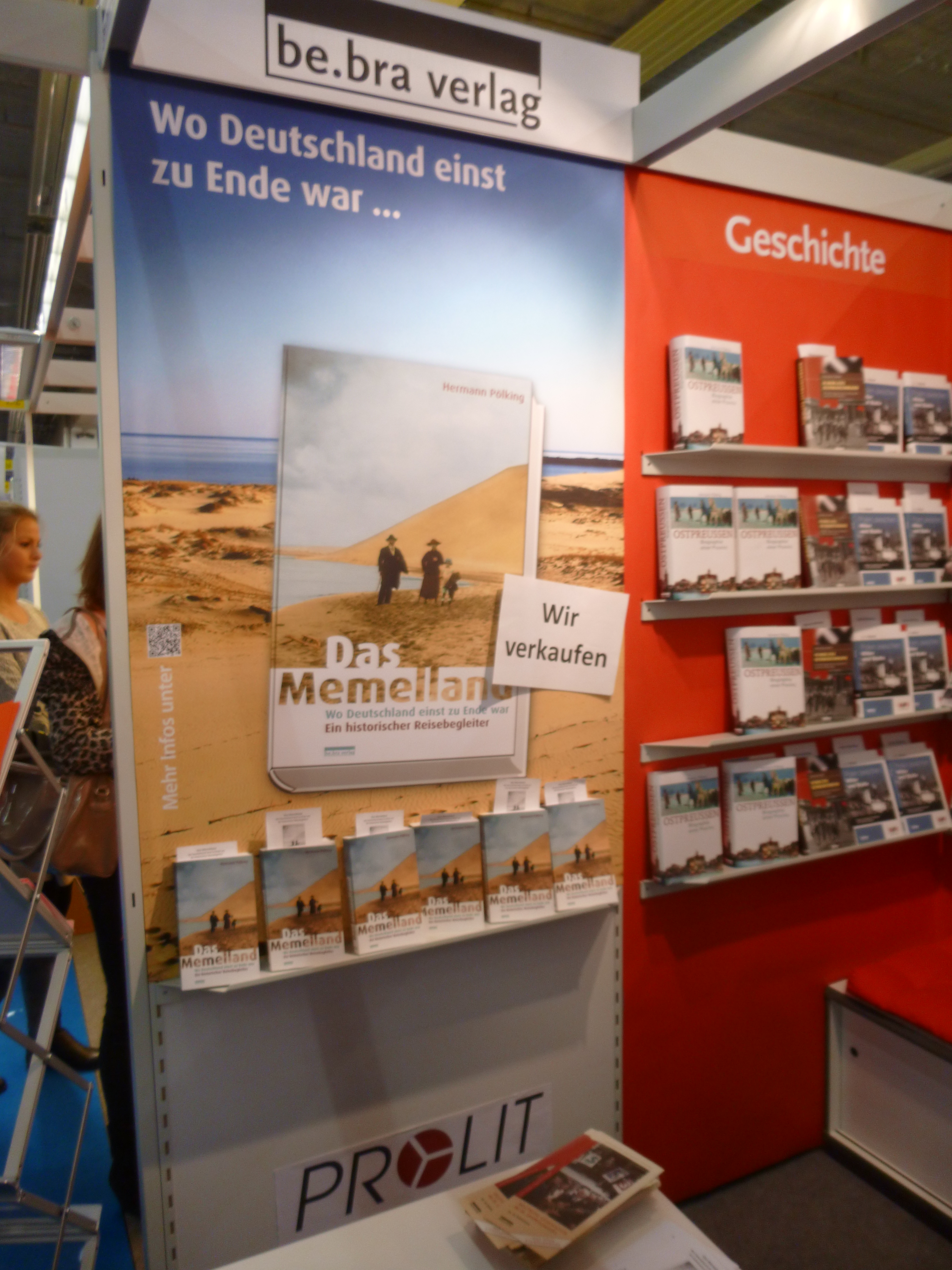 stando de la eldonejo be.bra en la Frankfurta librofoiro 2012